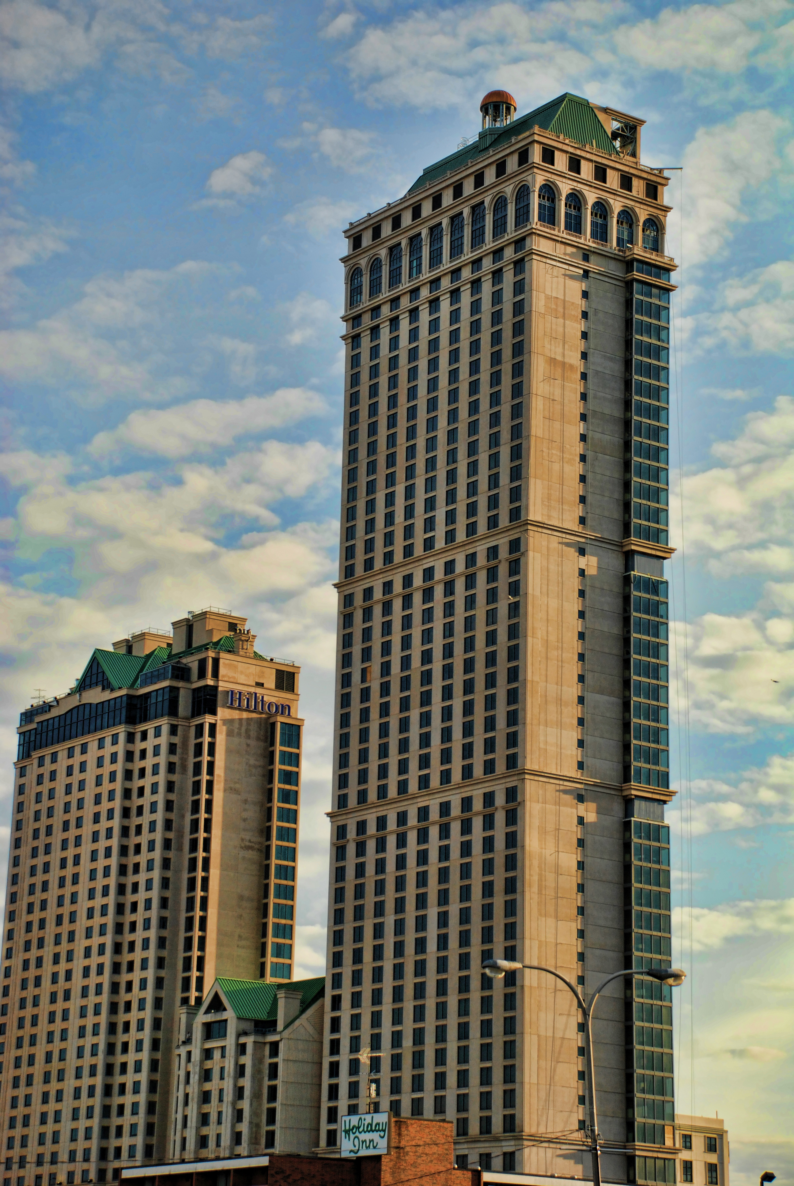 Niagara Falls, ON - 2009